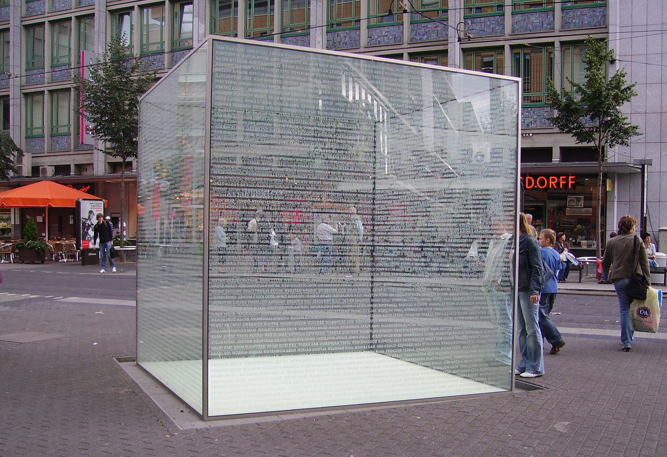 holocaust monument by Jochen Kitzbihler in Mannheim, Germany